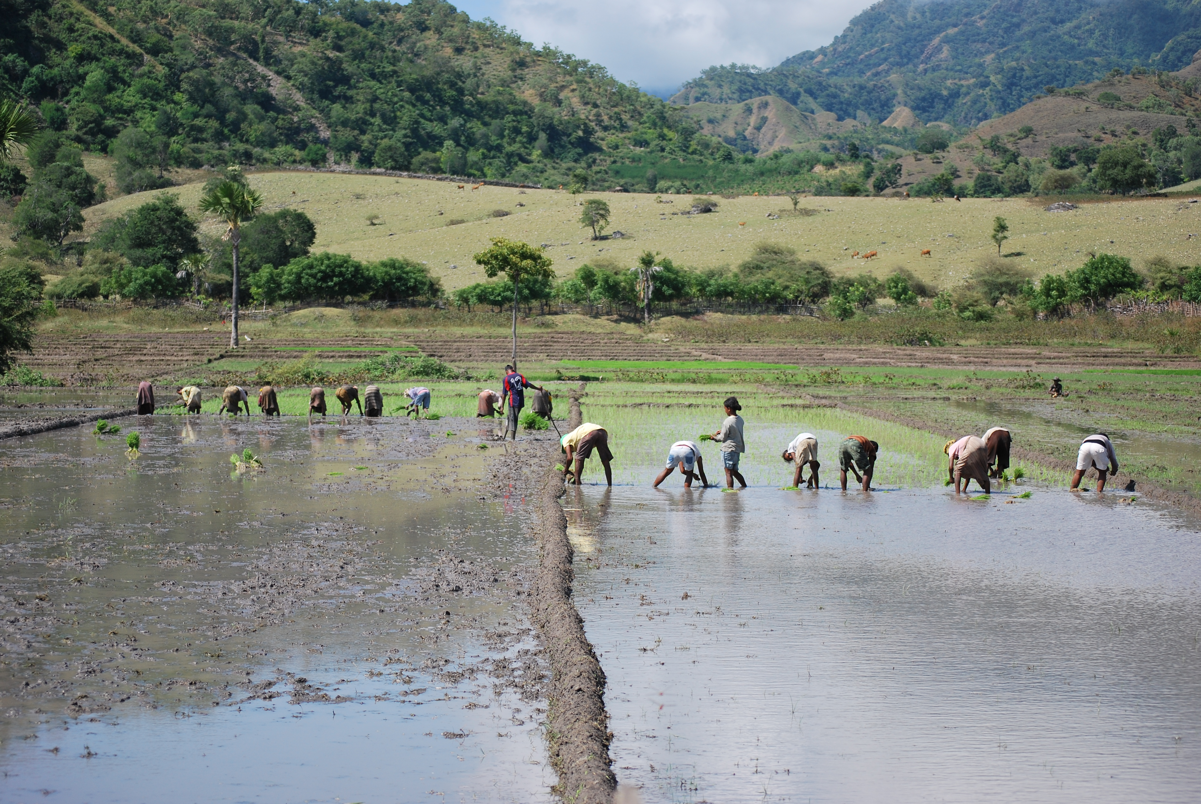 Reisfelder in Oemelo, Lifau, Oecusse